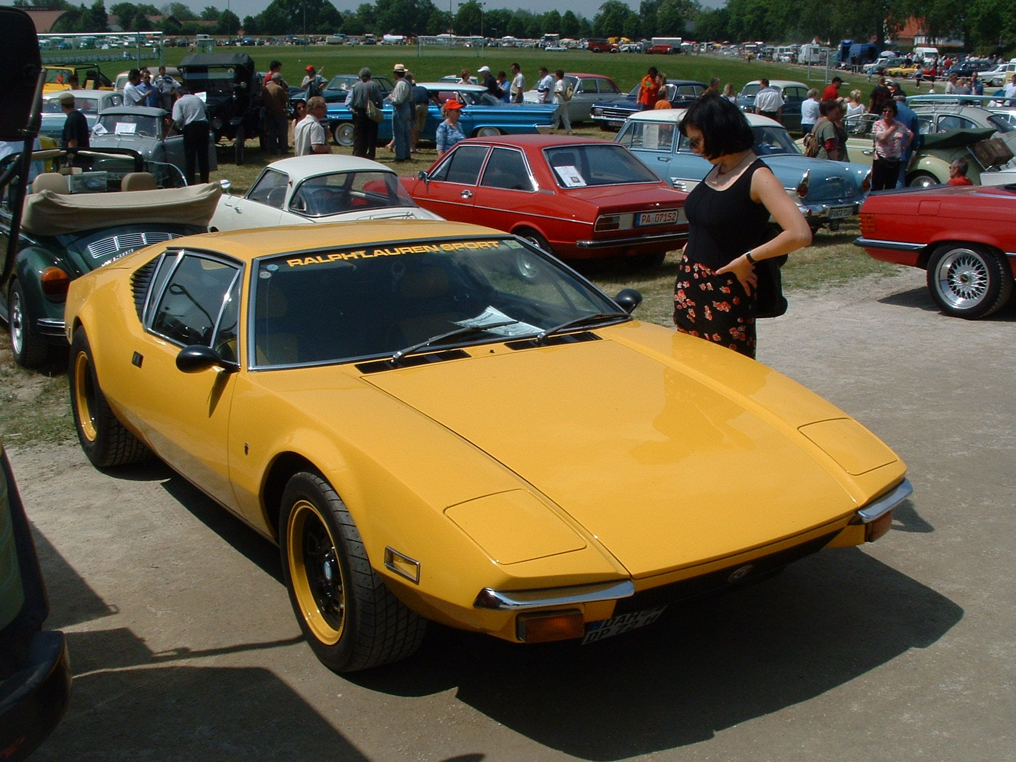 De Tomaso Pantera Frontansicht